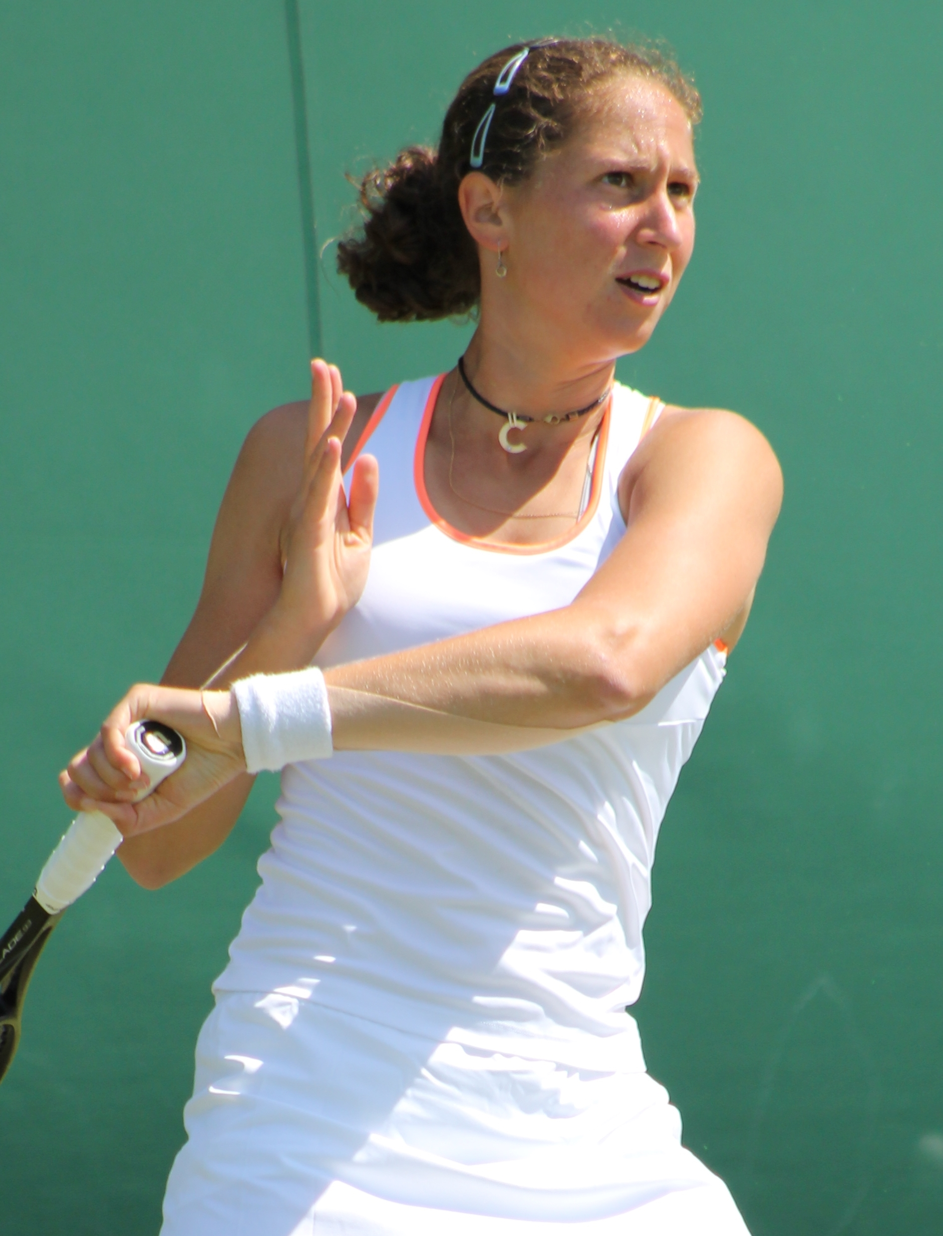 Feuerstein WMQ14 (3)